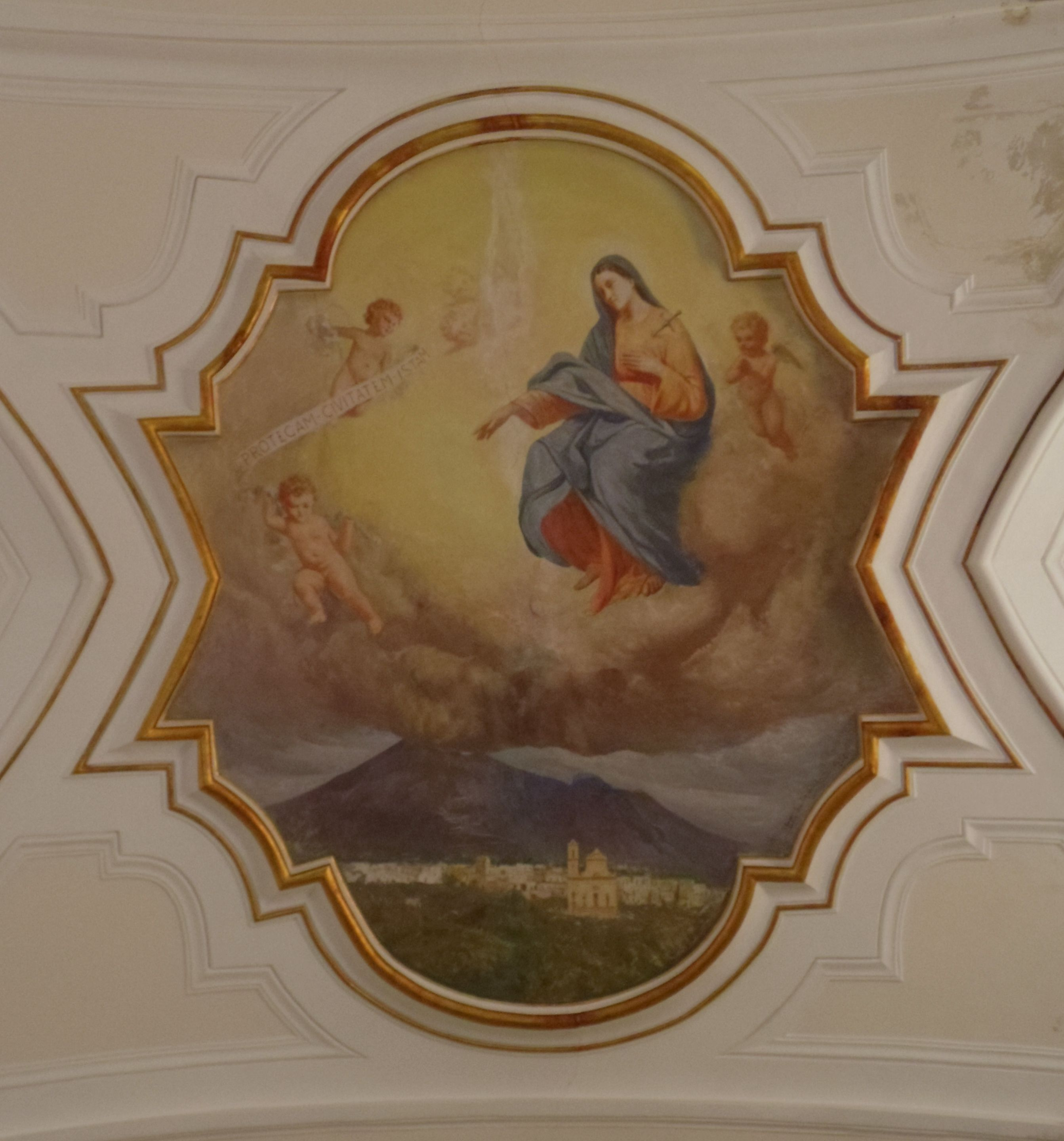 Boscotrecase, Chiesa dell'Ave Gratia Plena (detta anche L'Annunziatella): affesco de "La Madonna Addolorata che protegge Boscotrecase delle ceneri del Vesuvio".